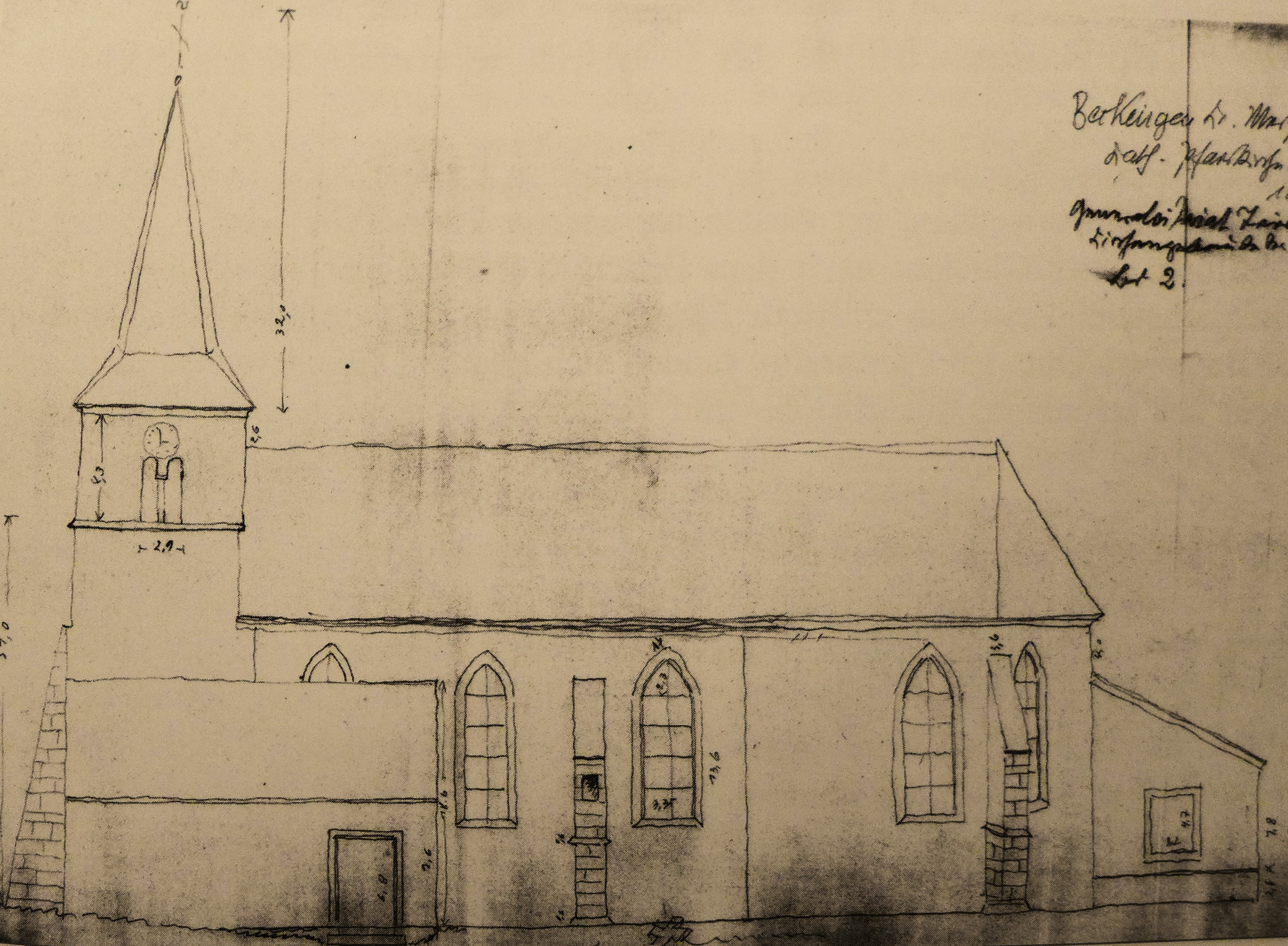 Beckingen, spätgotische Pfarrkirche, Zeichnung W. Zimmermann (Archiv Landesdenkmalamt Saarbrücken)